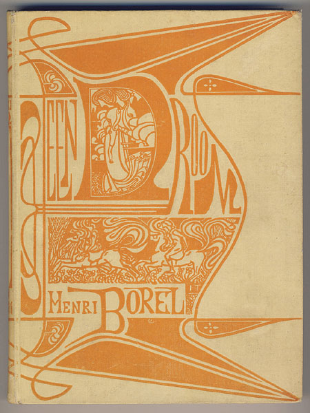 Boekomslag: Een droom. 1e druk 1899. Auteur: H. Borel. Bandontwerp: J. Toorop. Uitgeverij: Cohen en Zonen